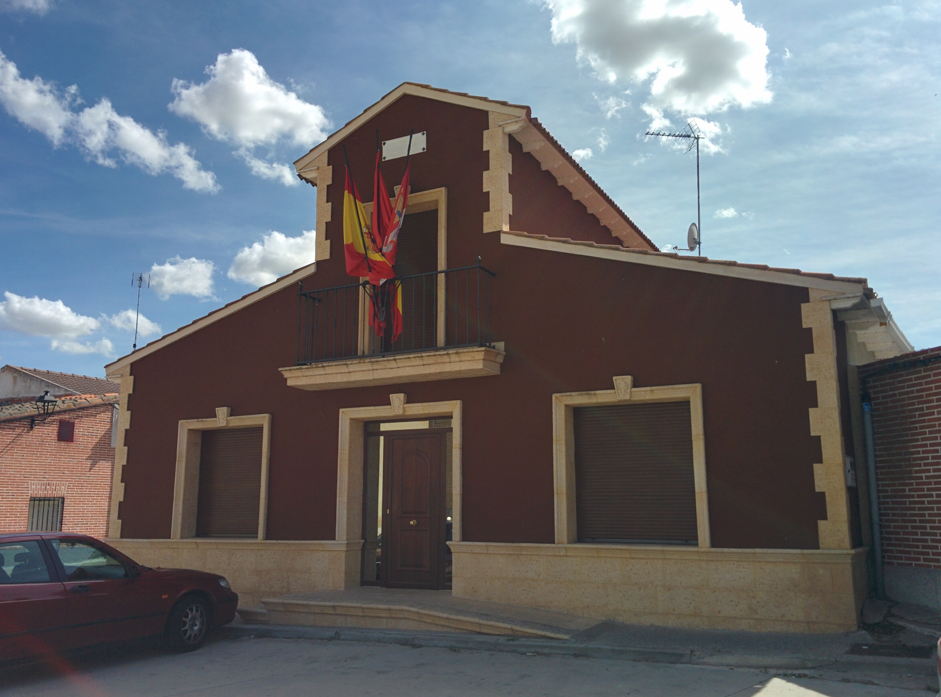 Casa consistorial de Moraleja de Matacabras (Ávila, España).